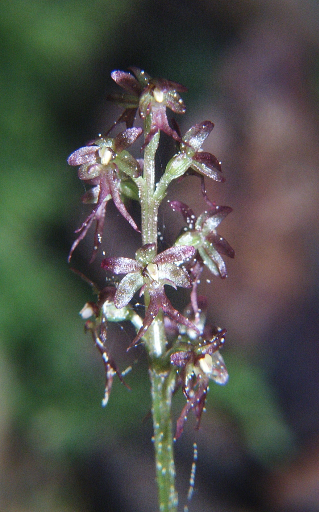 Listera cordata, nördlicher Schwarzwald, Germany